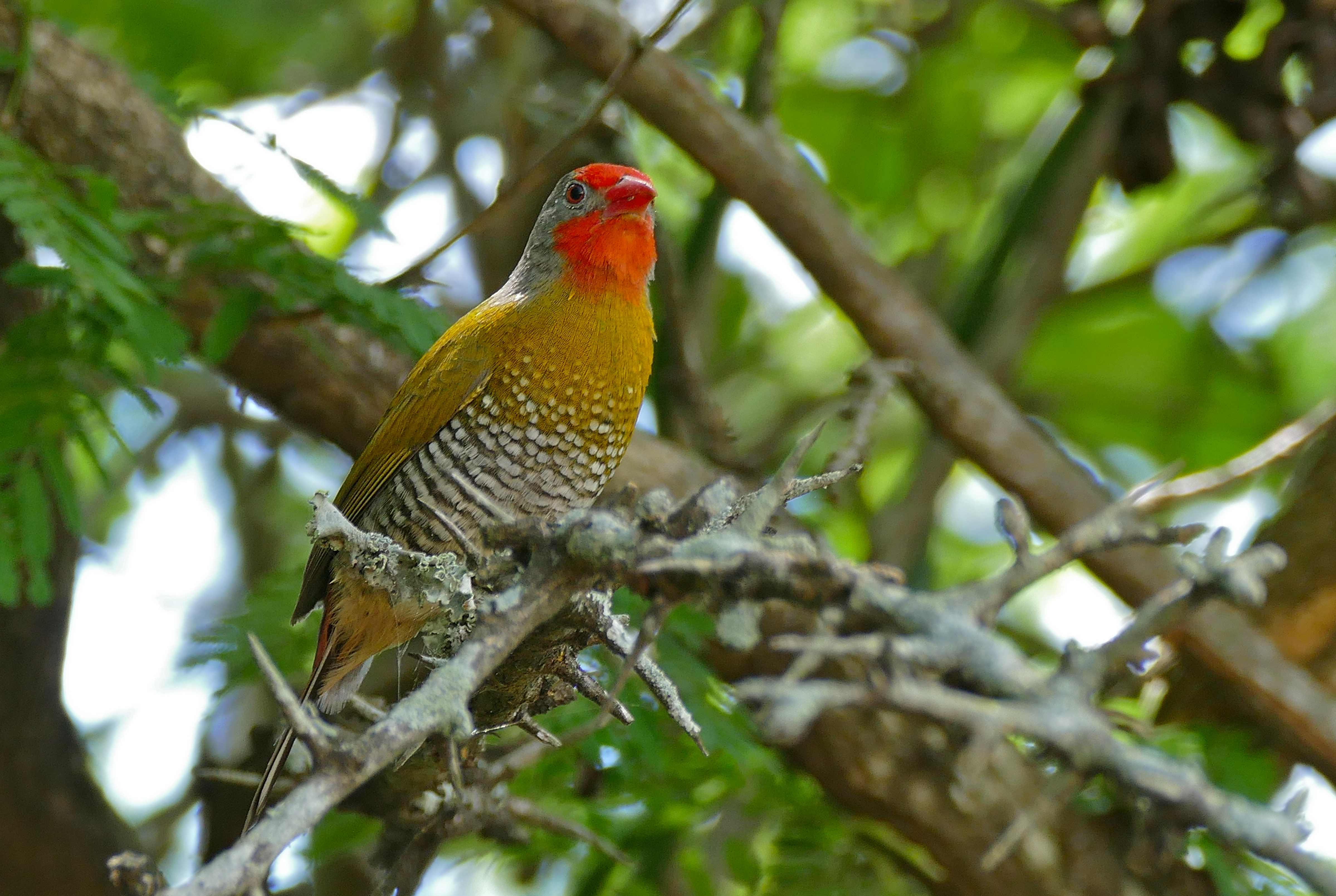 Lower Sabie Camp, Kruger NP, SOUTH AFRICA